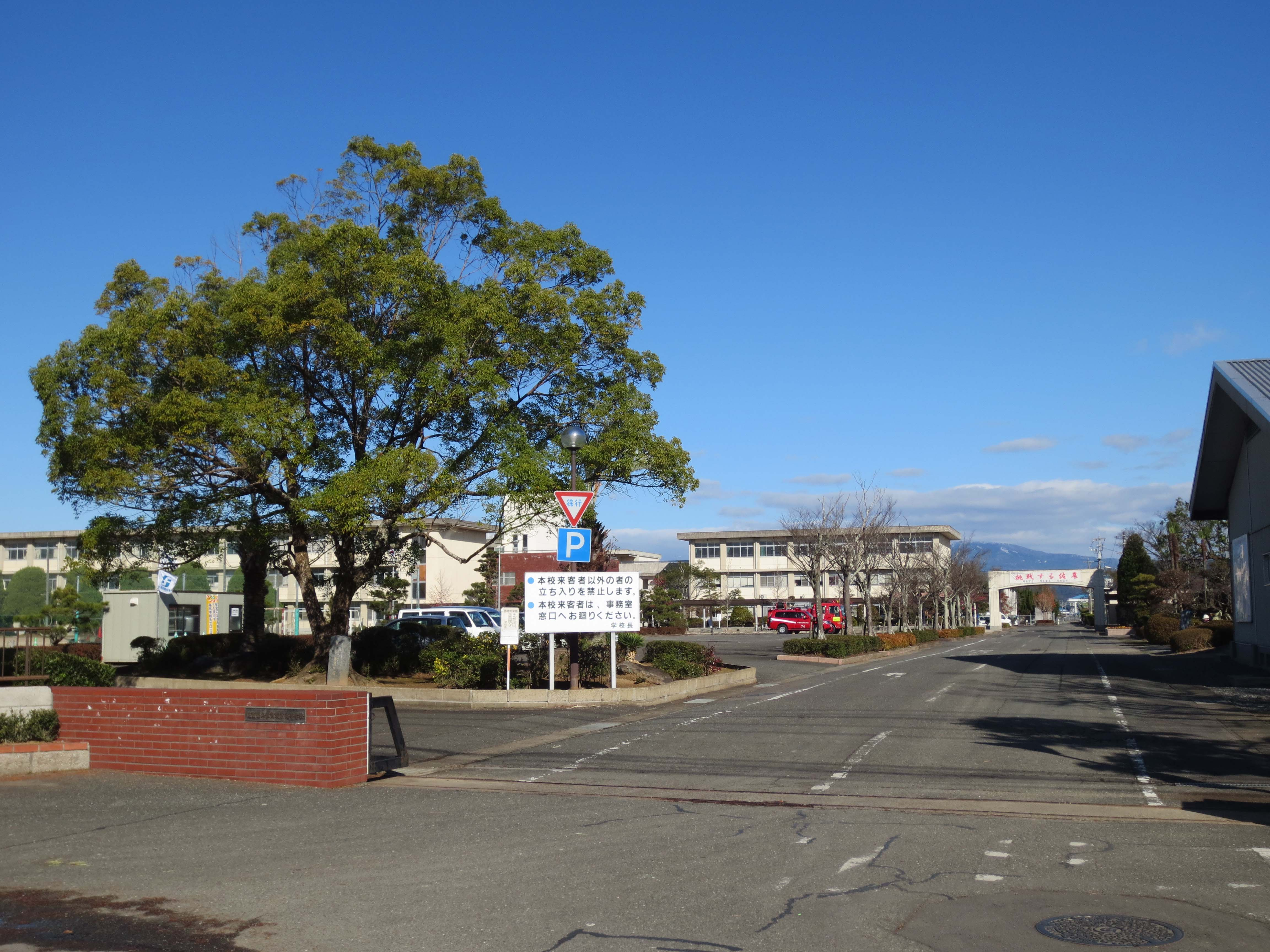 佐賀県立佐賀農業高等学校（佐賀県杵島郡白石町）